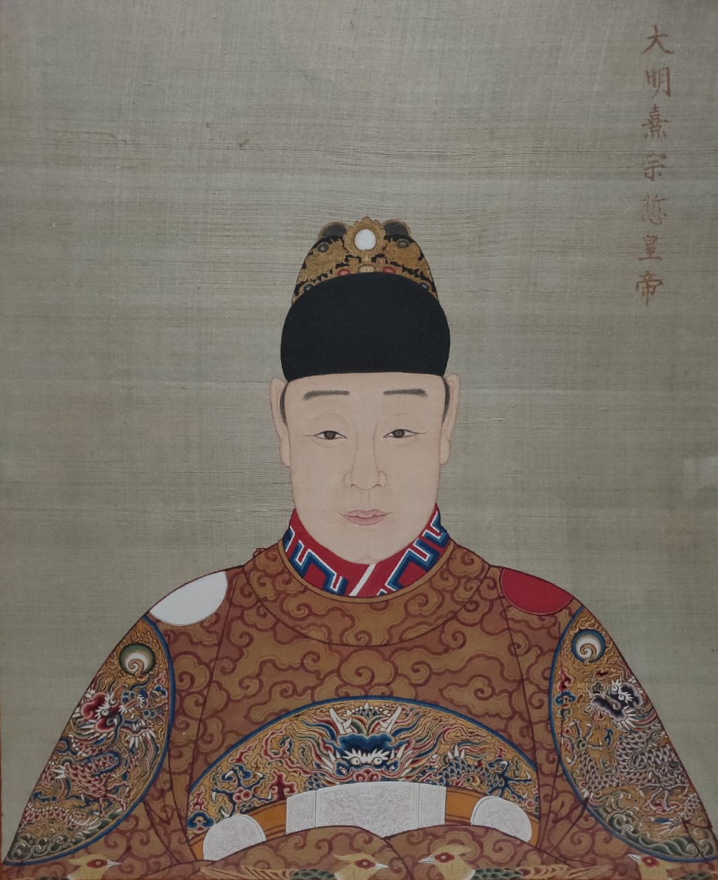 明代帝后半身像（二） 冊 熹宗悊皇帝